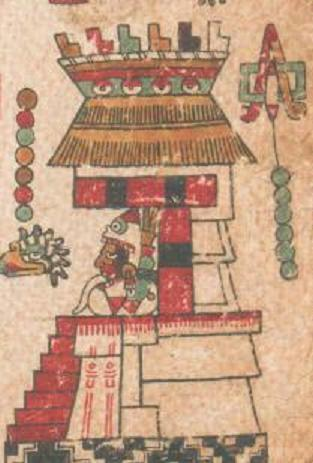 Templo del Cielo en Tilantongo, según el códice Nuttall